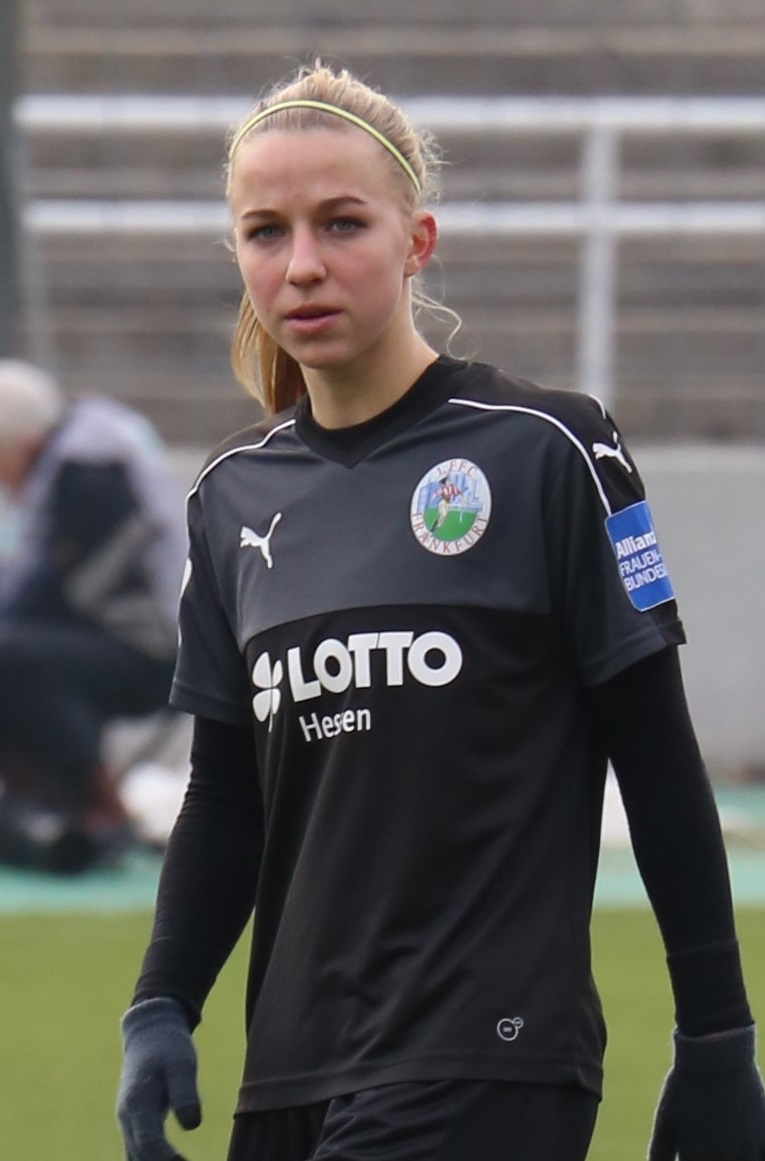 Jackie Groenen le 13 novembre 2016 avec le FFC Francfort.